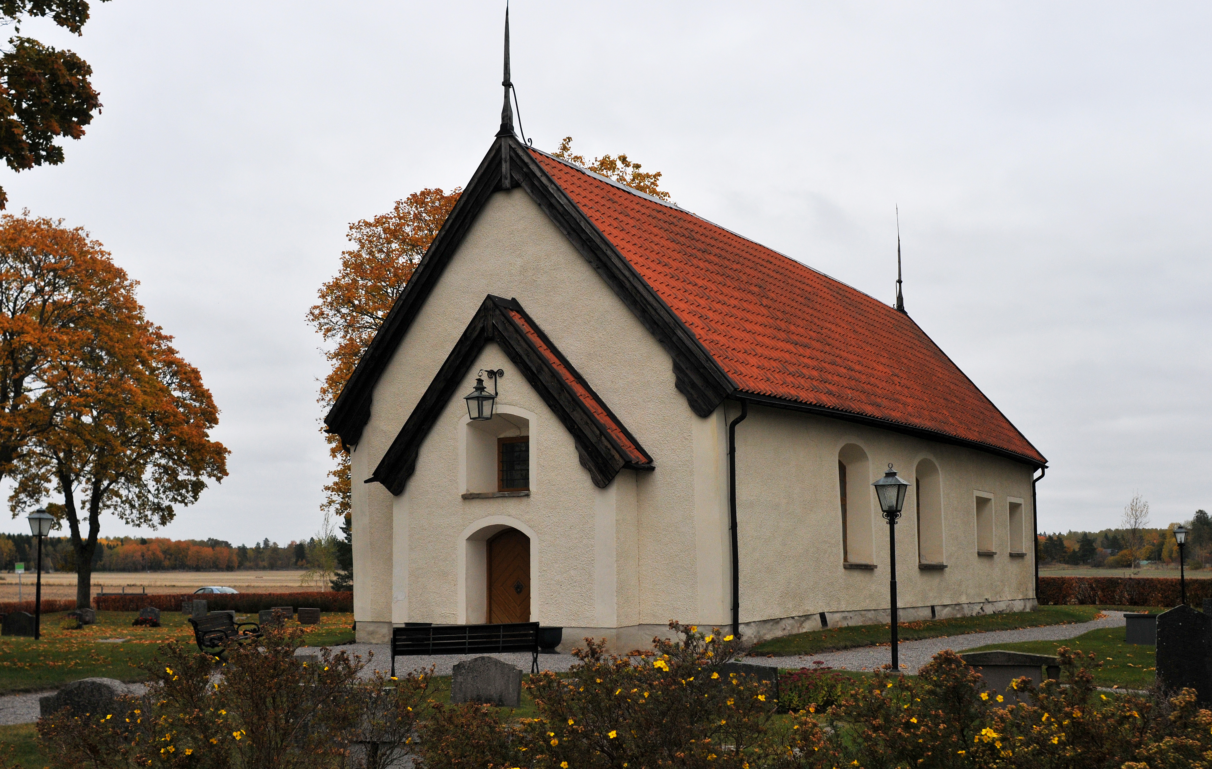 Råby-Rekarne kyrka är en kyrkobyggnad i Hällby församling i Eskilstuna kommun. Kyrkan uppfördes på 1100-talet och är en av Sörmlands äldsta och minsta kyrkor.